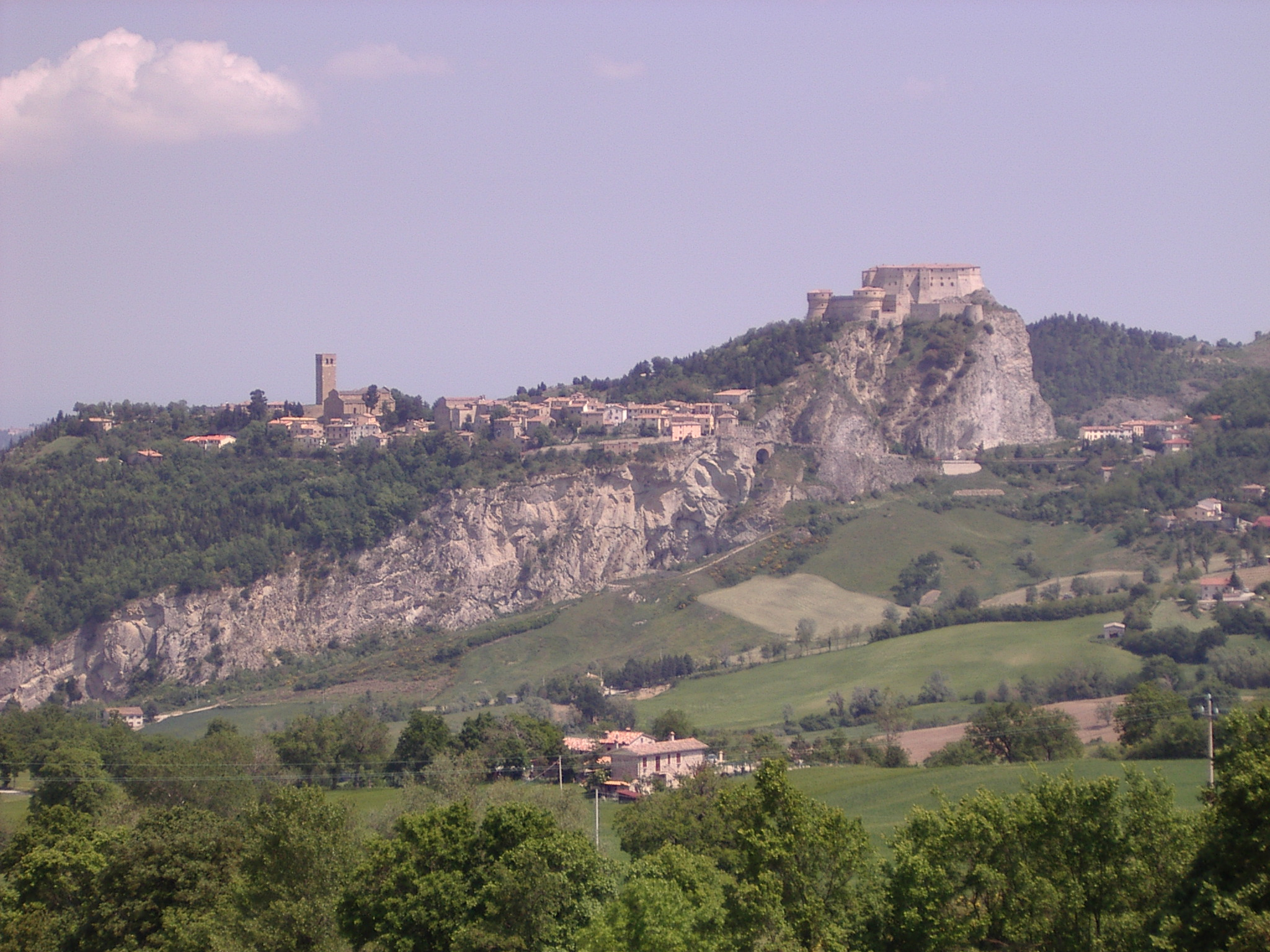 San Leo, Emilia-Romagna, Italy.